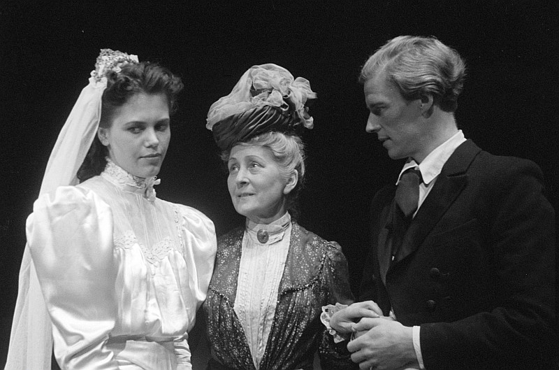 Original image description from the Deutsche FotothekSzenenbilder